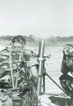 Les mortiers de 81 mm du 2e REP en action lors d'une opération de ratissage après la prise de la ville de Kolwézi